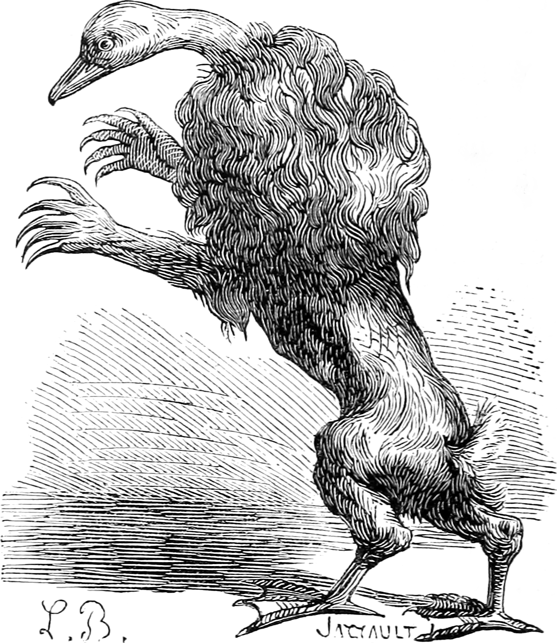 Une illustration pour l’article Ipès dans le Dictionnaire infernal par Collin de Plancy.